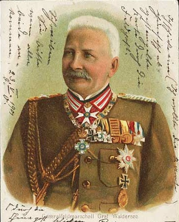 Alfred Graf von Waldersee. 1901 versandte mit der Chinesischen Kaiserlichen Post (Stempel: Paoting: 23. Mai 01) bis nach Basel (8.7.01) verschickte Postkarte. Aufschrift: Generalfeldmarschall Graf Waldersee. Gruss aus China (den unteren Teil der Karte habe ich vor dem Hochladen abgeschnitten)